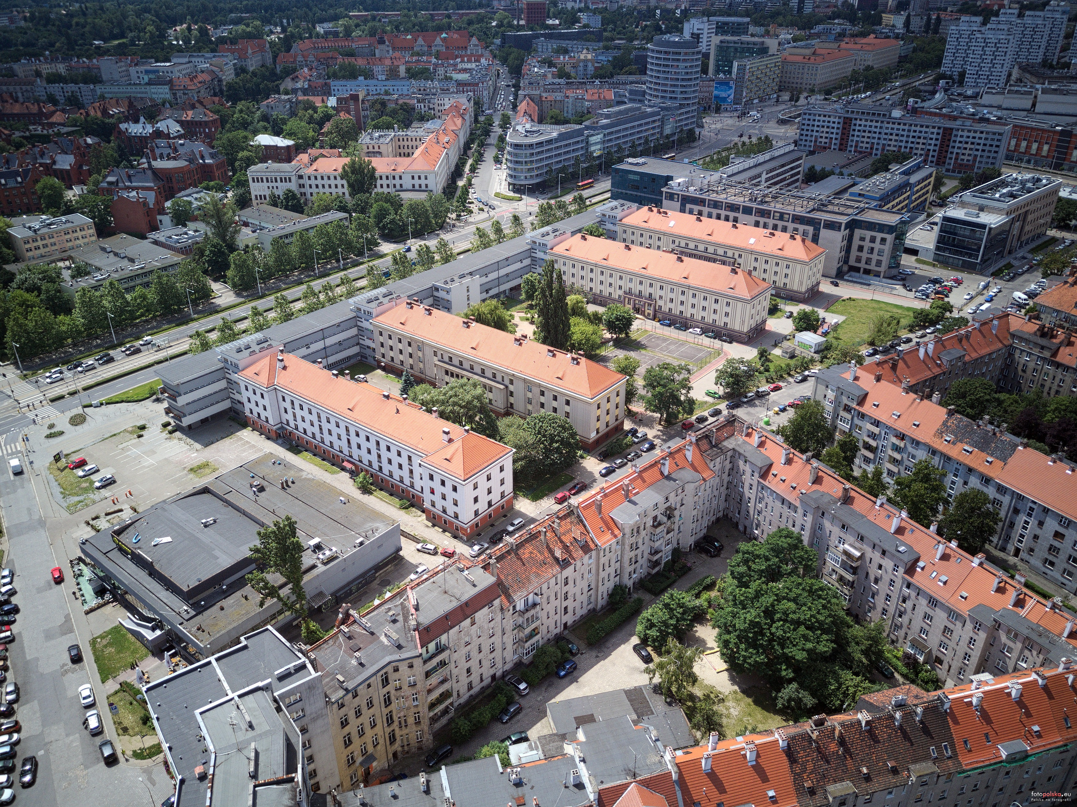 Domy akademickie przy ul. Grunwaldzkiej/pl. Grunwaldzkim we Wrocławiu, od lewej „Centaur”, „Talizman”, „Straszny Dwór” i „Telemik”. Za nimi zasłaniający je „Parawanowiec” (funkcjonujący jako dwa akademiki – „Parawanowiec” i „Słowianka”)